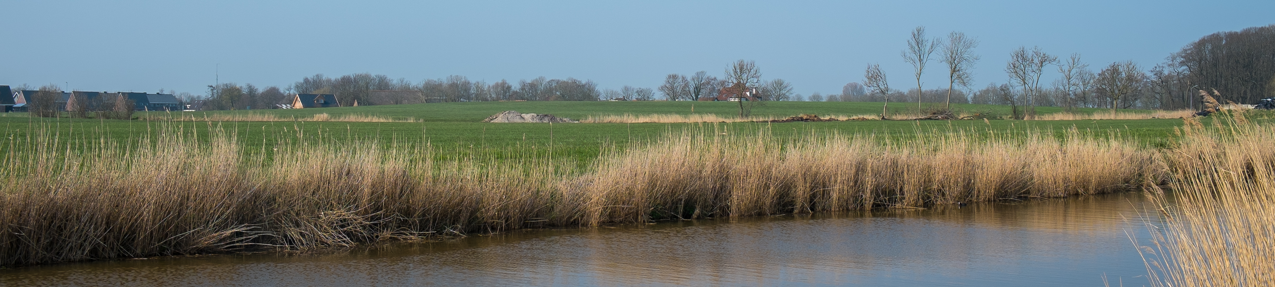 Panorama over de oostelijke Tuinsterwierde of wierde Tuinsterheerd vanaf het Scheeftilsterpad over de Hoornse Vaart. Linksachter (westen) nieuwe woningen uit het uitbreidingsplan, op de achtergrond de rentenierswoning aan noordzijde en rechtsachter de oprijlaan naar Verhildersum en de boerderij Tuinsterheerd.